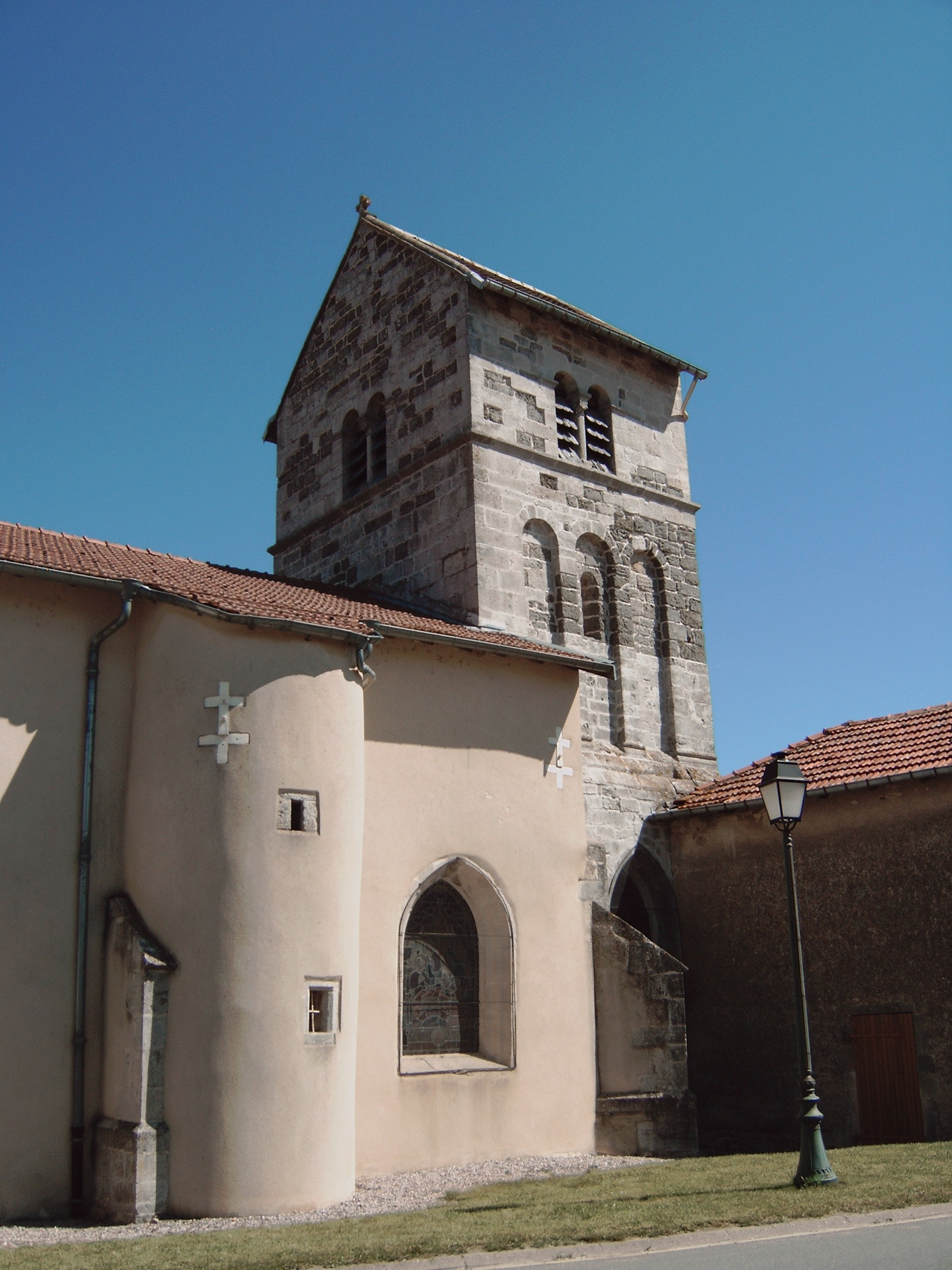 Eglise de Forcelles Saint Gorgon